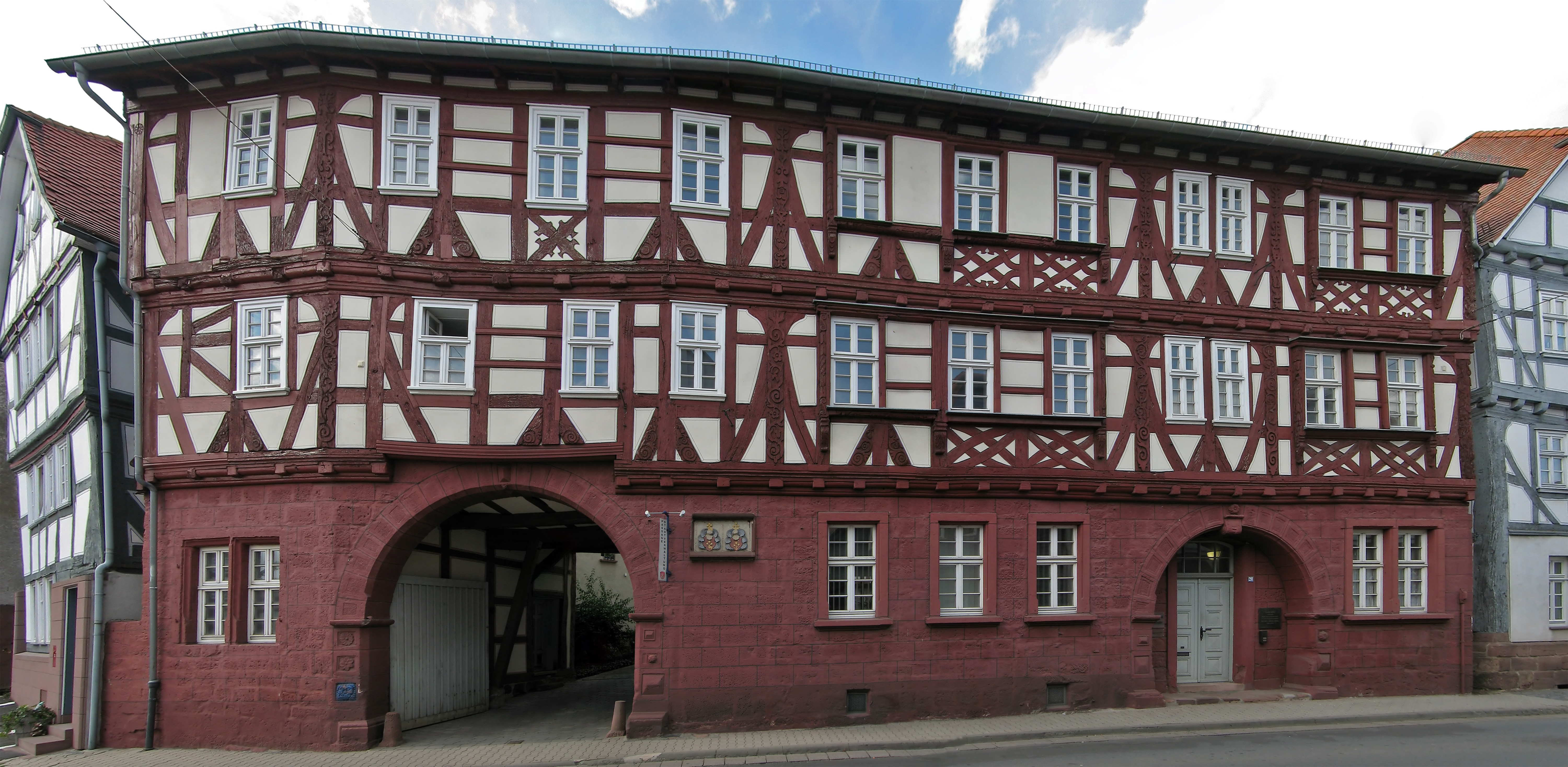 Der "Blaue Löwe", das Geburtshaus von Eberhard Werner Happel in Kirchhain